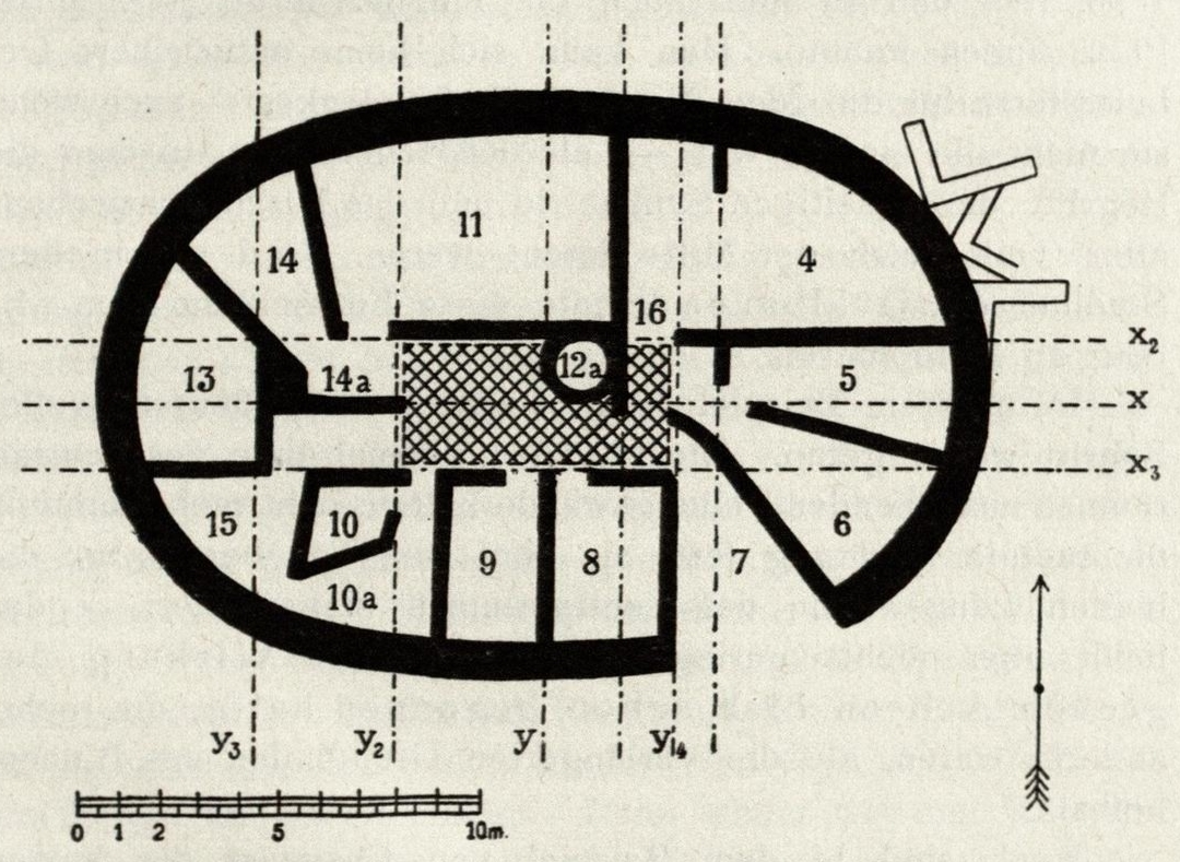 Plan des Ovalhauses von Chamaizi (nach Ferdinand Noack, 1908), Gemeinde Sitia, Kreta, Griechenland